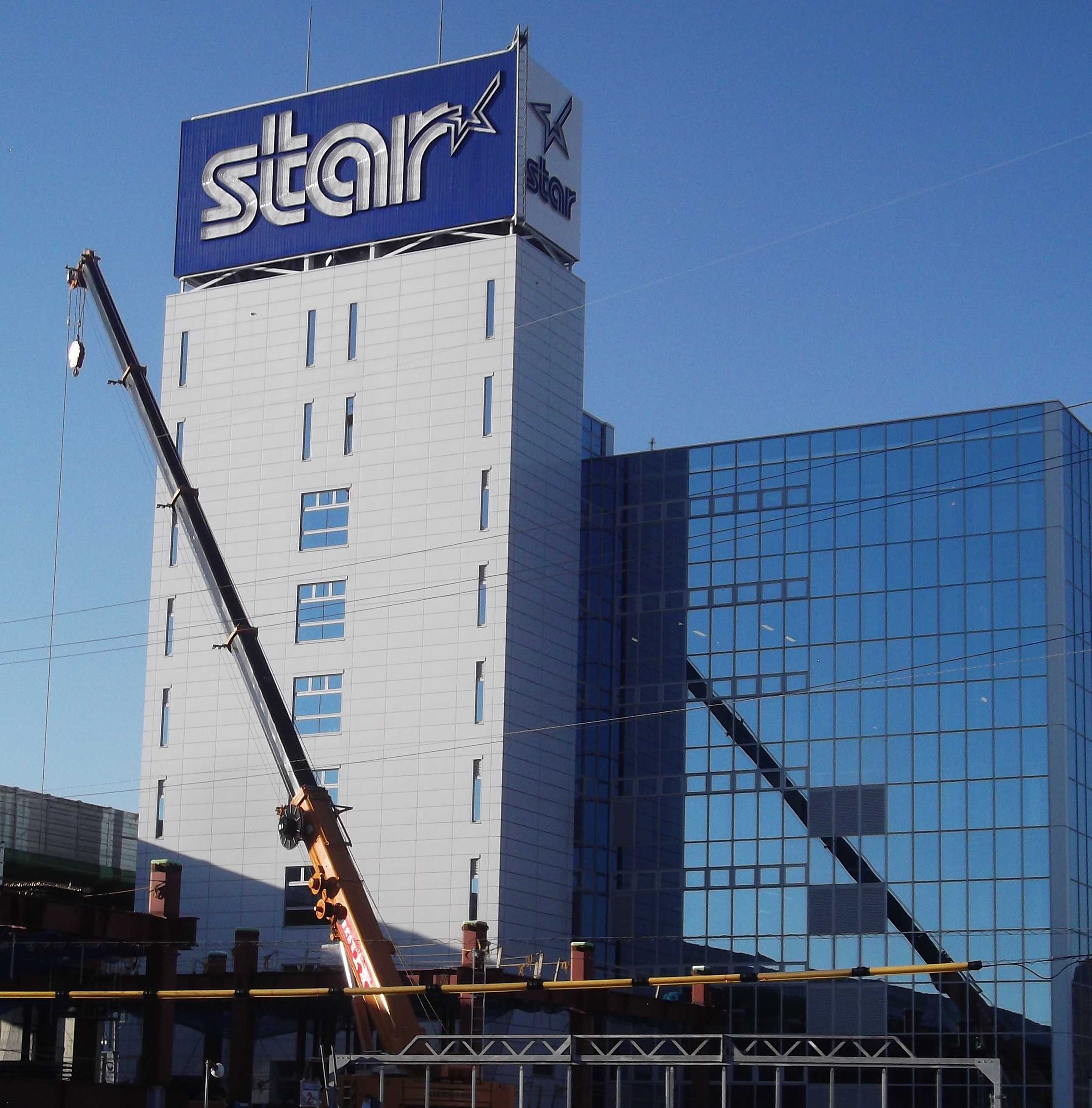 スター精密本社ビル。隣の高速道路は東名高速道路。